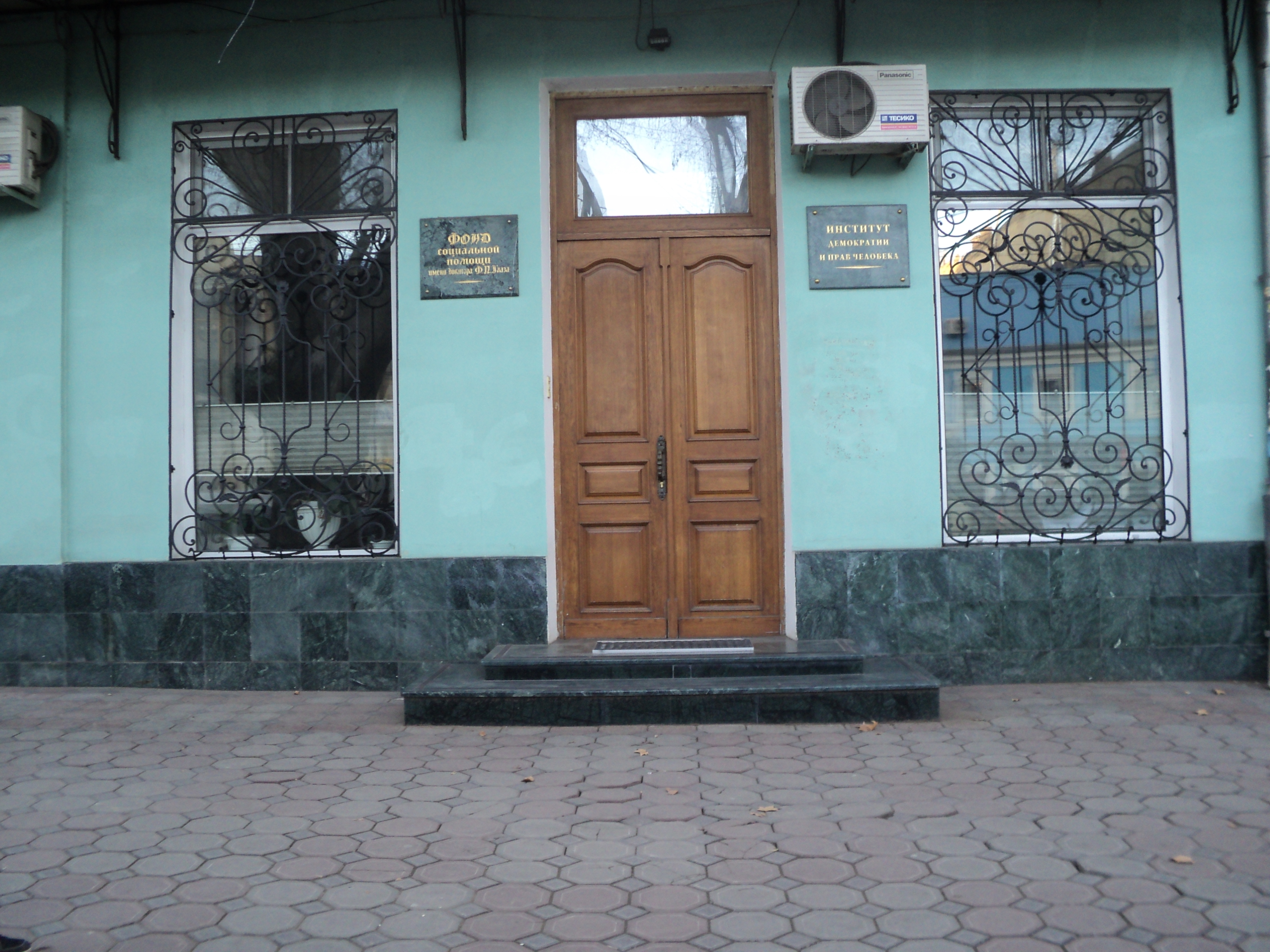 Офис Фонда социальной помощи им. доктора Ф.П. Гааза и Института демократии и прав человека в Одессе (Украина).